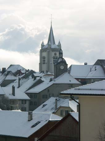 Vue sur les toits de la vieille ville et le clocher de l'église de Cossonay - janvier 2005 Auteur: Bättig André